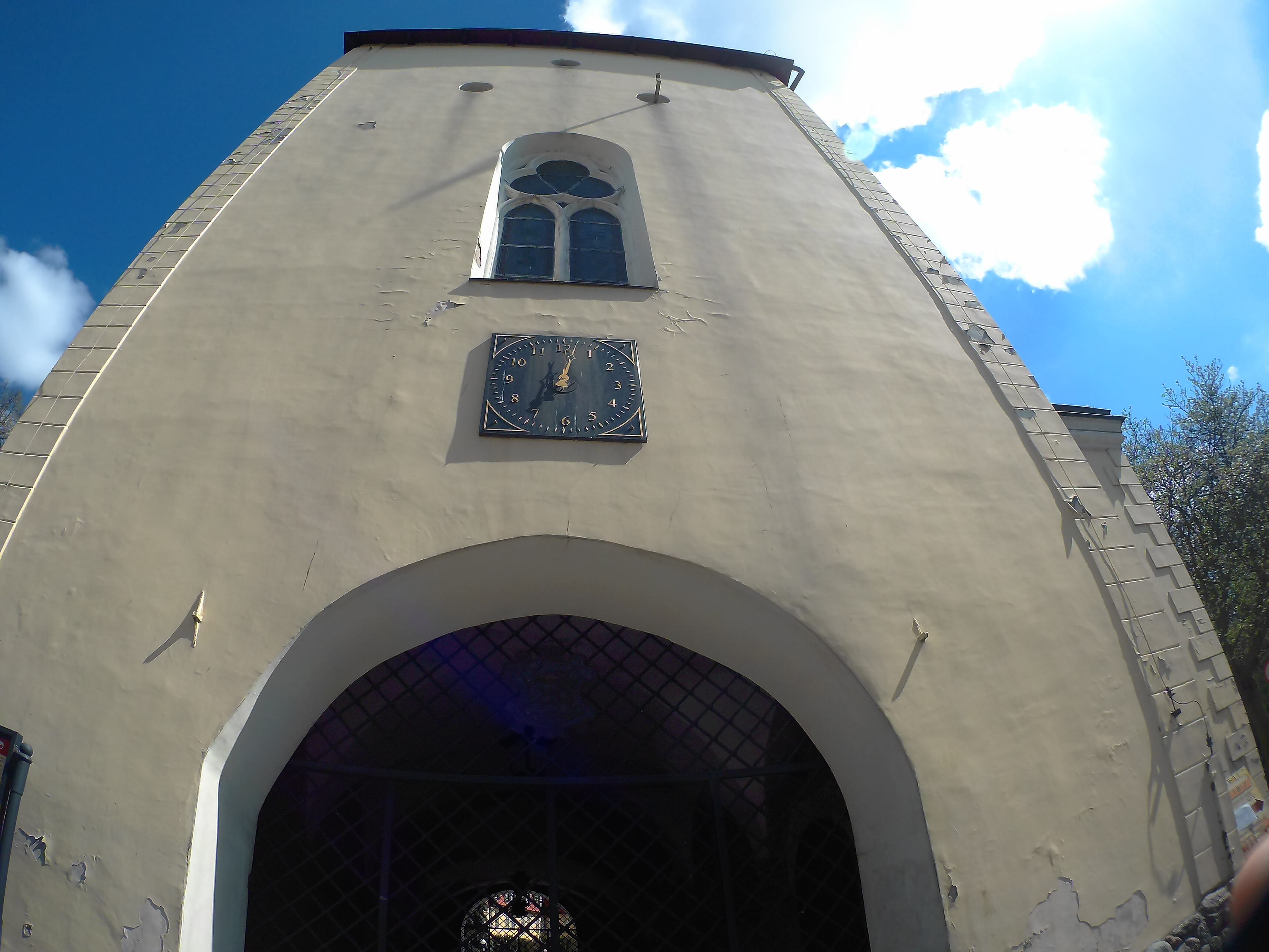 Zdjęcie Bramy Grudziądzkiej, znajdującej się w Chełmnie